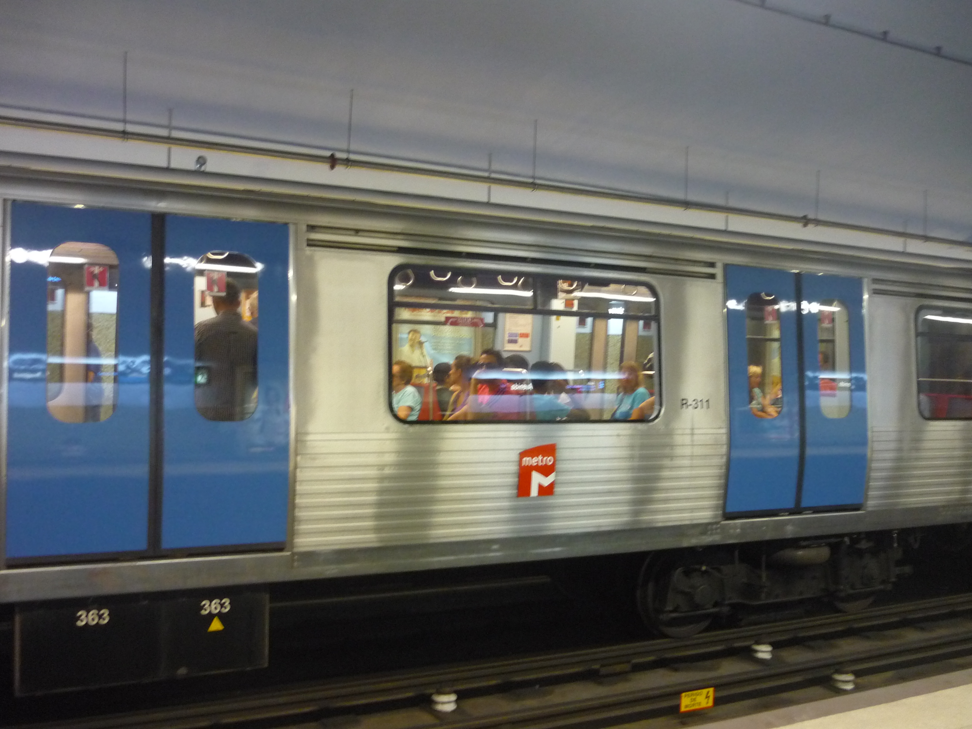 carrozza metro